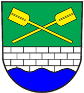 Znak obce Bystrička, který byl obci udělen 25. listopadu 2003. V zeleném štítě zkřížené zlaté lopaty - karbovačky nad stříbrnou kvádrovanou zdí vyrůstající z modré vlnité paty. [1]